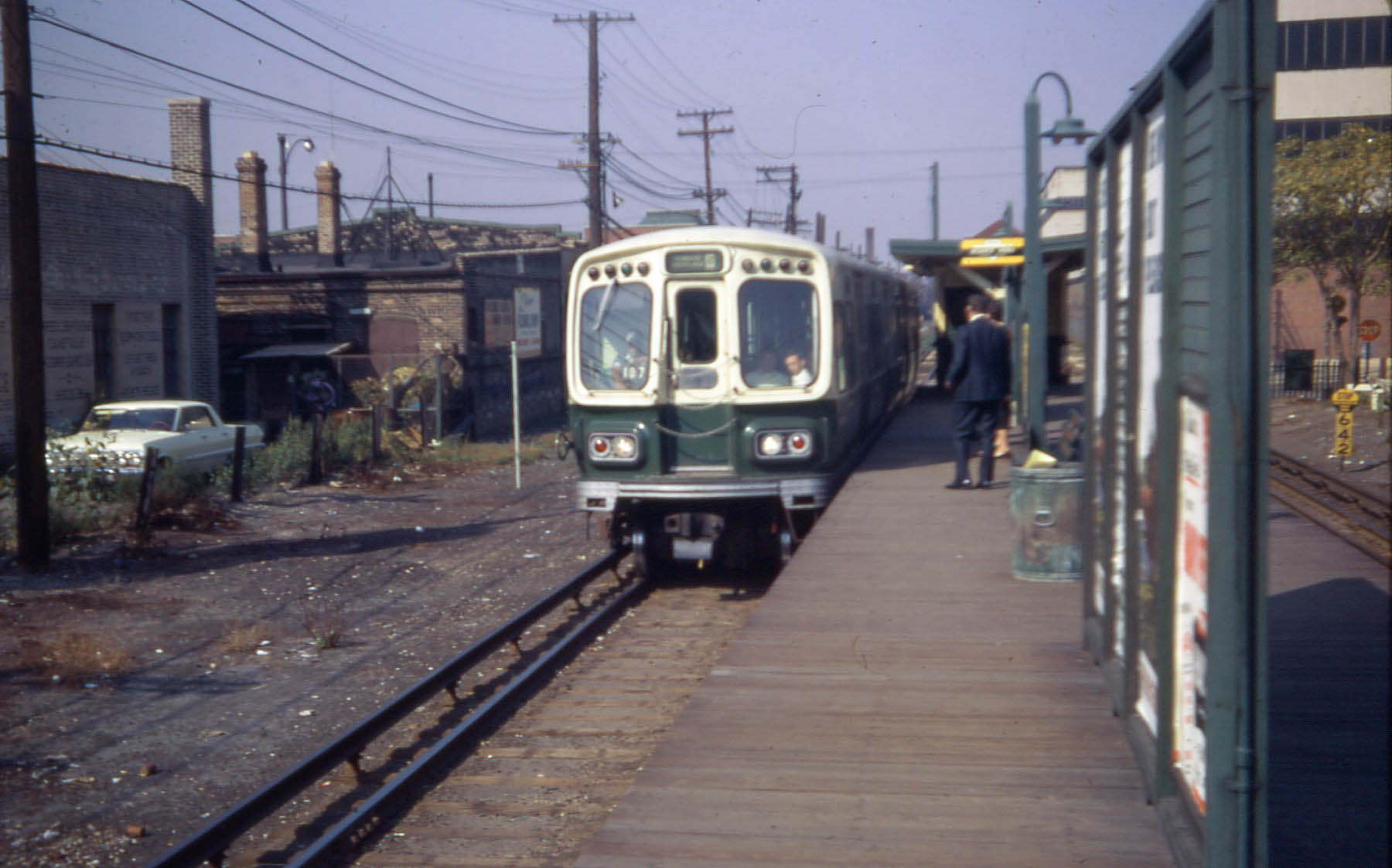 19670906 02 CTA Douglas L @ Laramie Ave